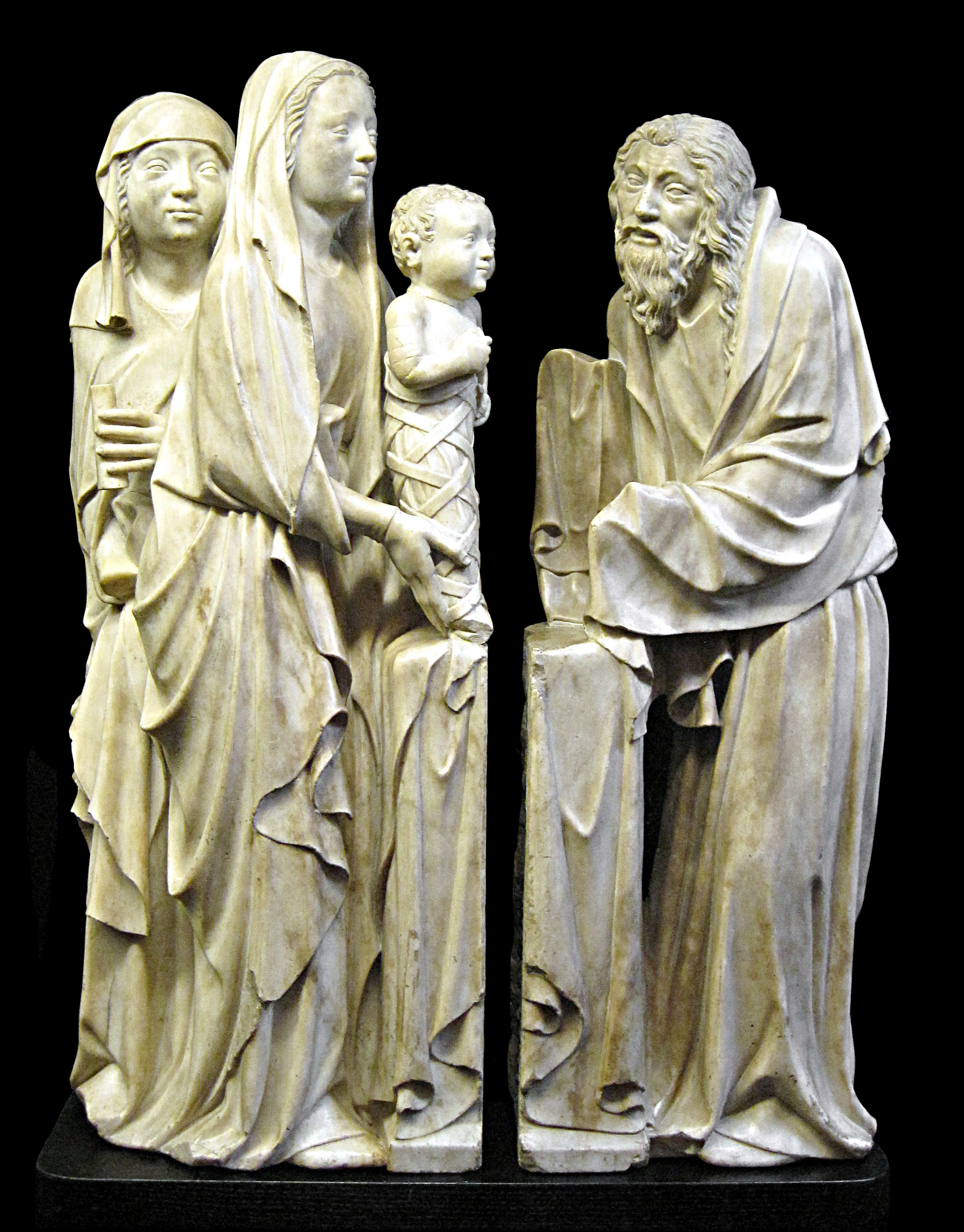 Groupe sculpté en marbre représentant « La Présentation au Temple », réalisé durant la seconde moitié du XIVe siècle, attribué à Jean de Liège (actif de 1361 à sa mort en 1381) ou à André Beauneveu (vers 1335-1403/1413), exposé dans la section du musée national du Moyen Âge du musée de Cluny à Paris, et y photographié le 09 décembre 2011 lors de la visite organisée à l’occasion de la cérémonie de remise des prix de Wikilove France 2011.